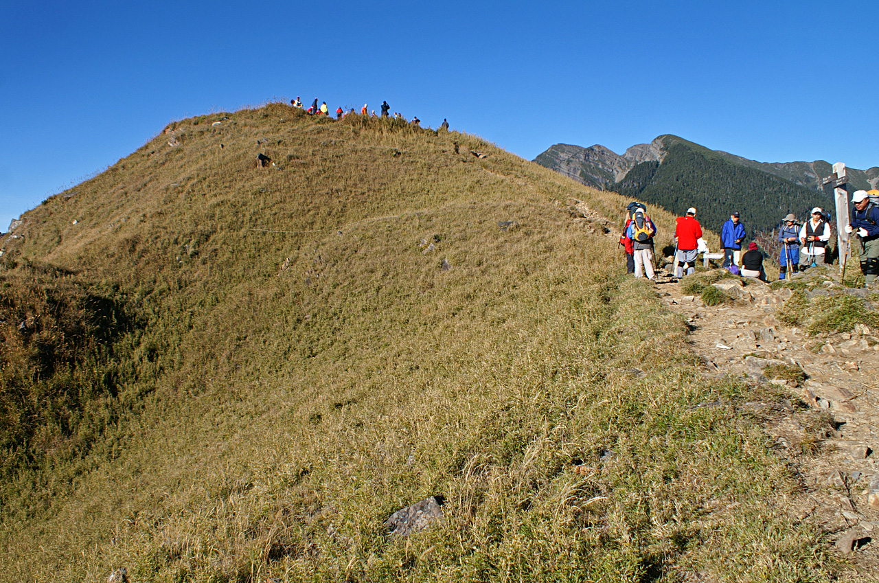 Hsueh Mountain Easten Peak 台灣雪山東峰